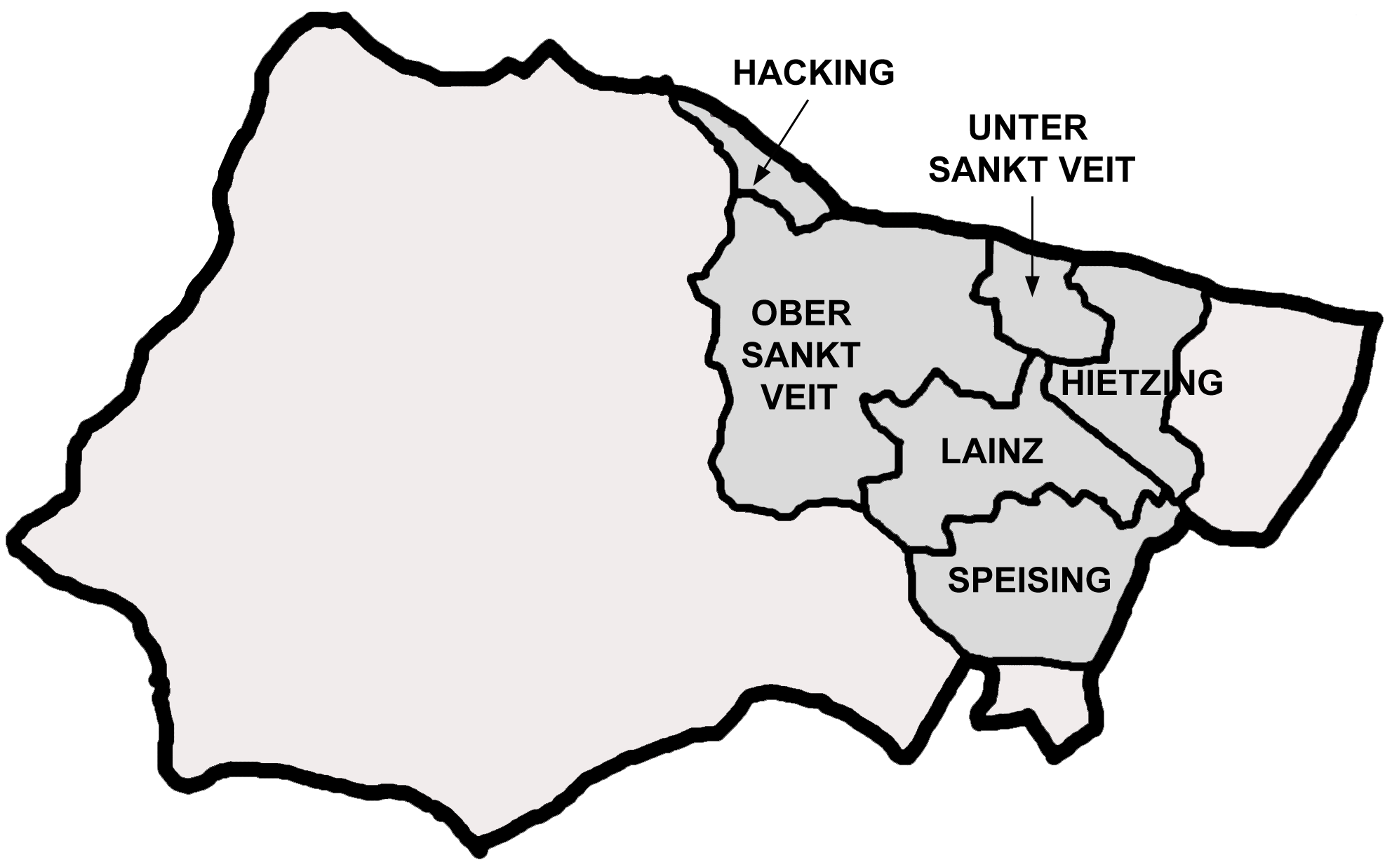 Karte der Bezirksteile von Hietzing in Wien